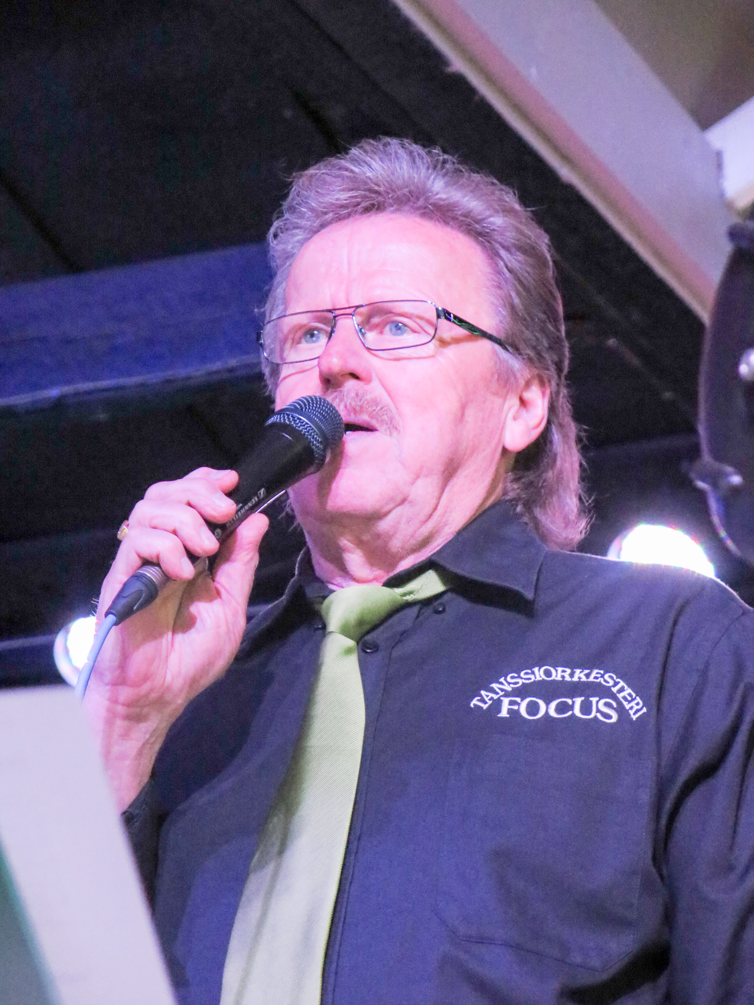 Sakke Kotilainen suomalainen laulaja